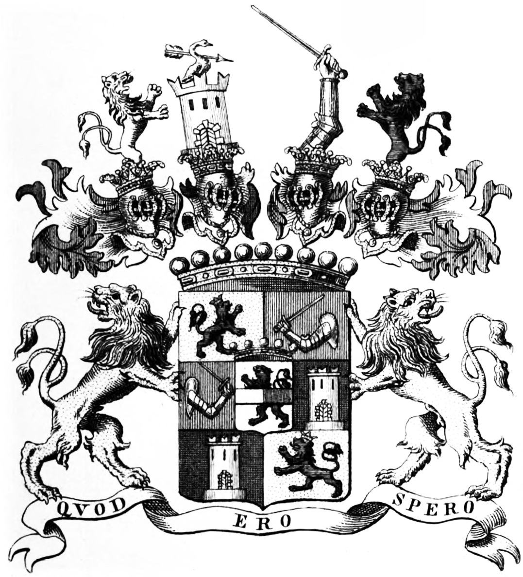 Wappen der Grafen von Wallis auf Carrighmain 1724